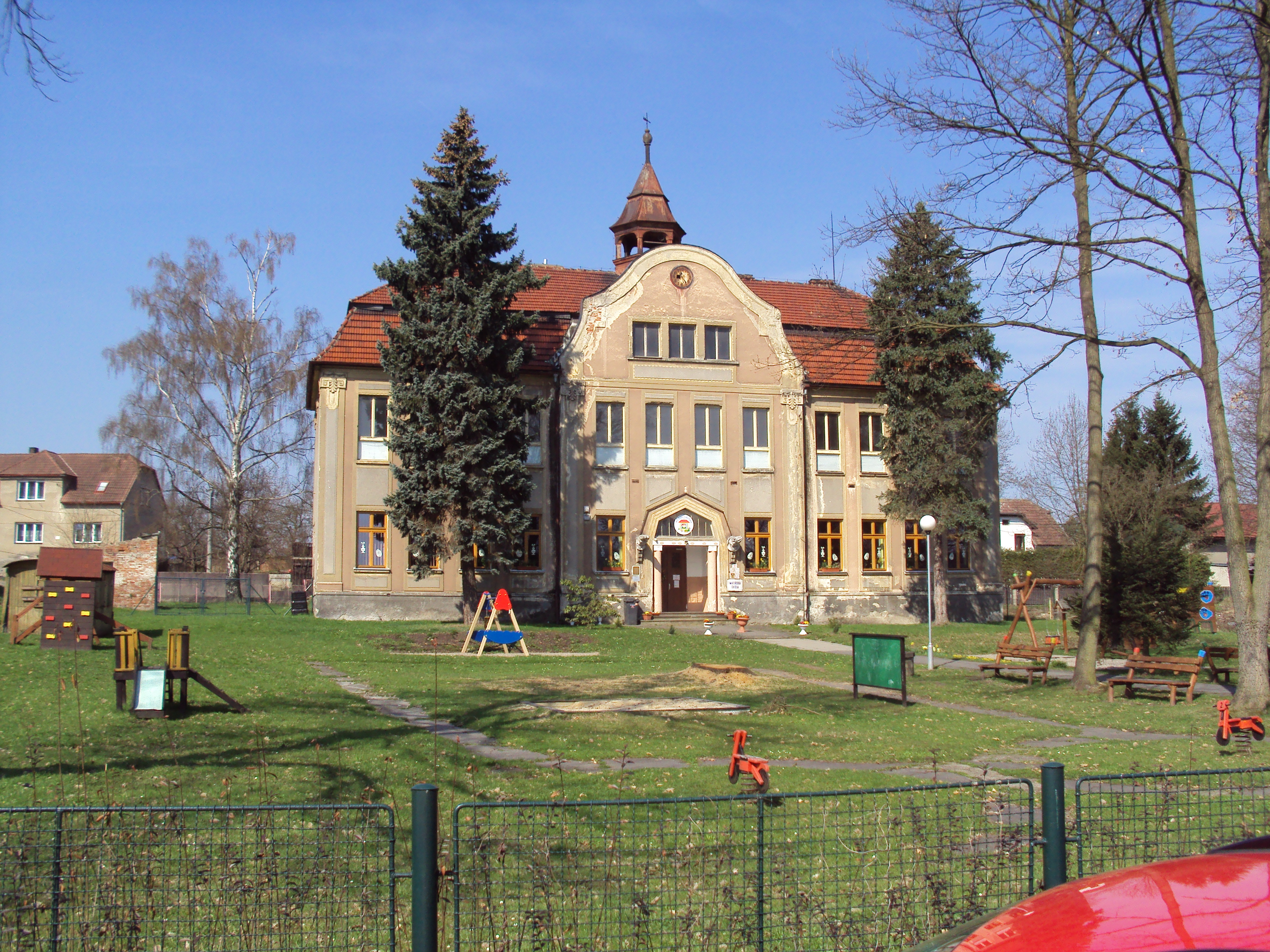 Kdysi škola, dnes Mateřská školka v Dolní Libchavě